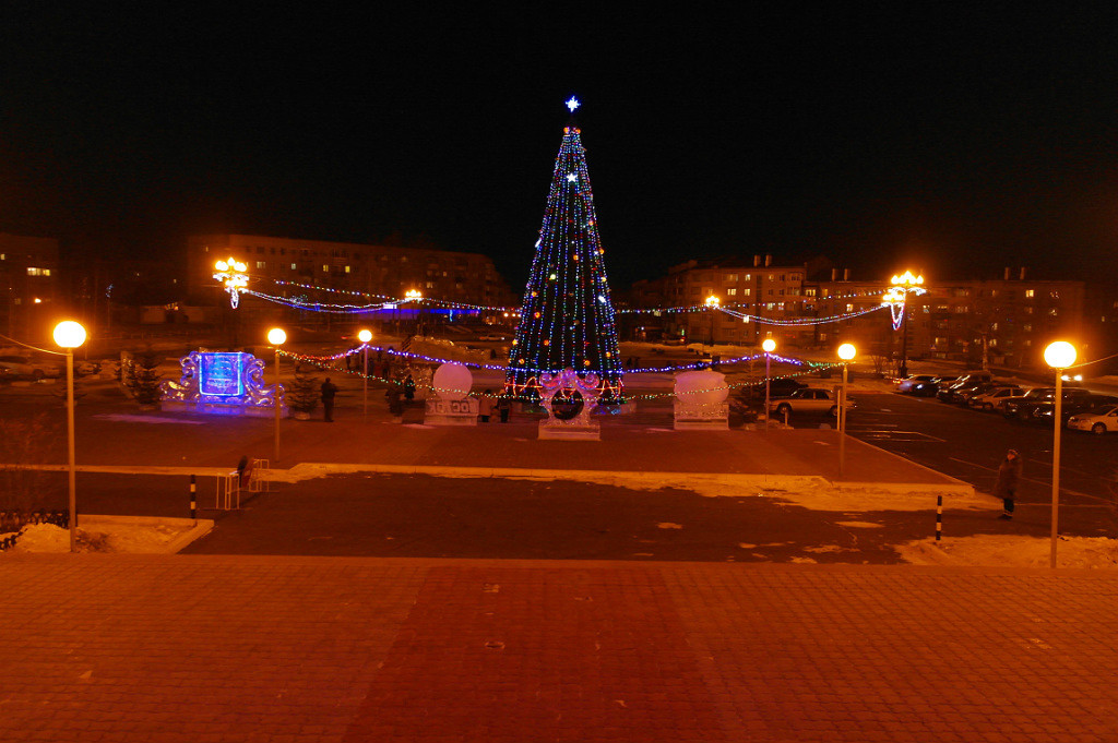 Ванино площаль Мира - Новогодняя елка